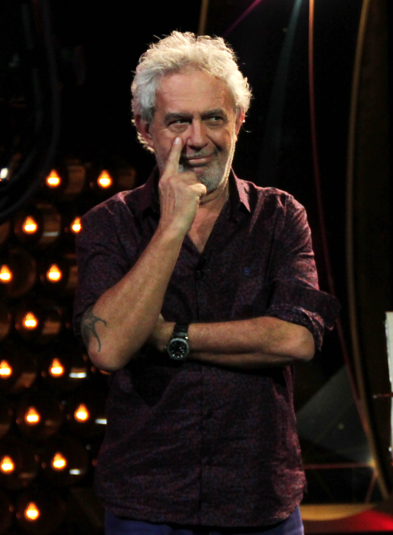 Matías Martín y Lalo Mir en Línea de tiempo. 09.09. 2014. Foto: TVP 2014